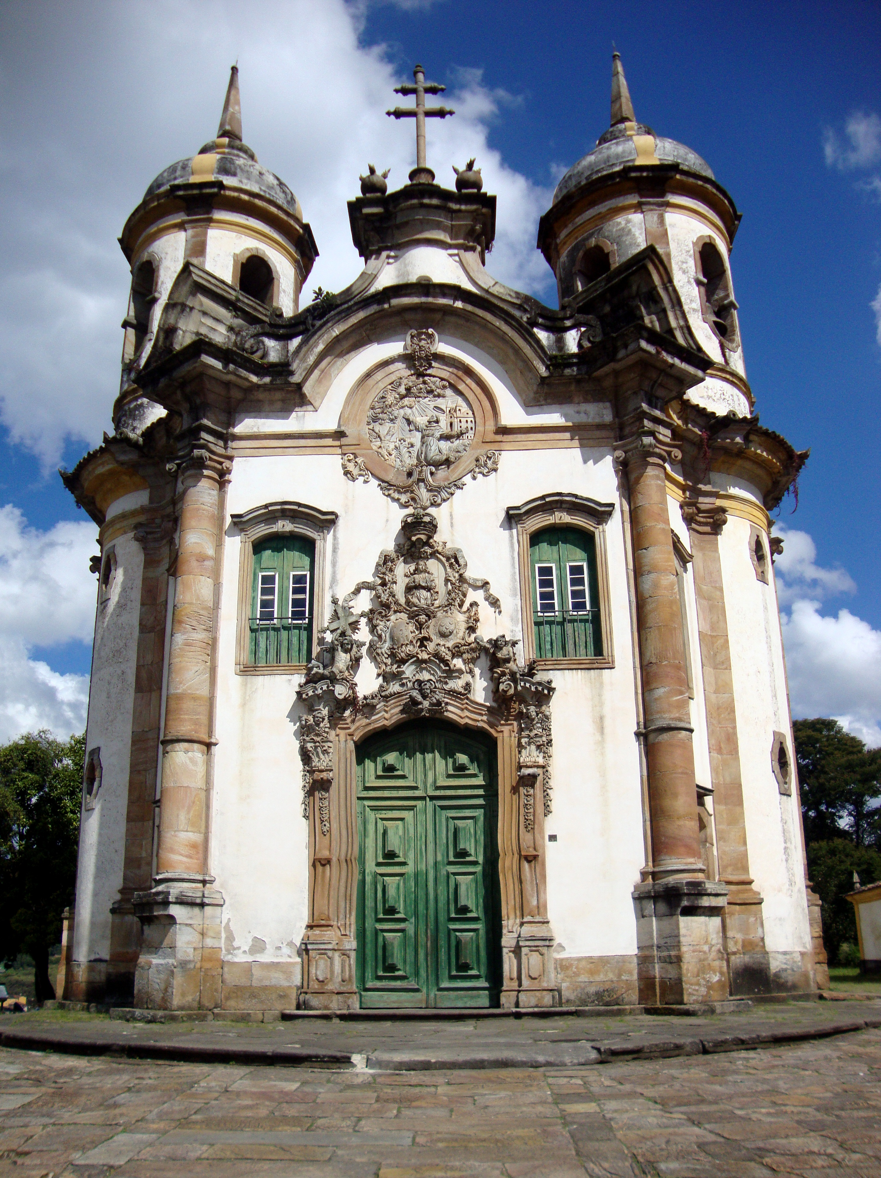 Igreja de São Francisco de Assis